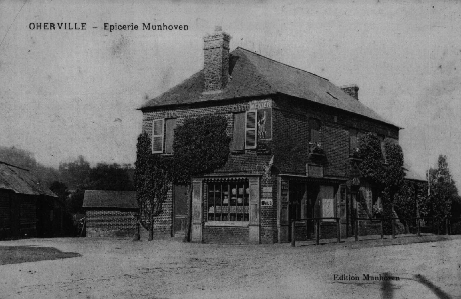 Epicerie Munhoven